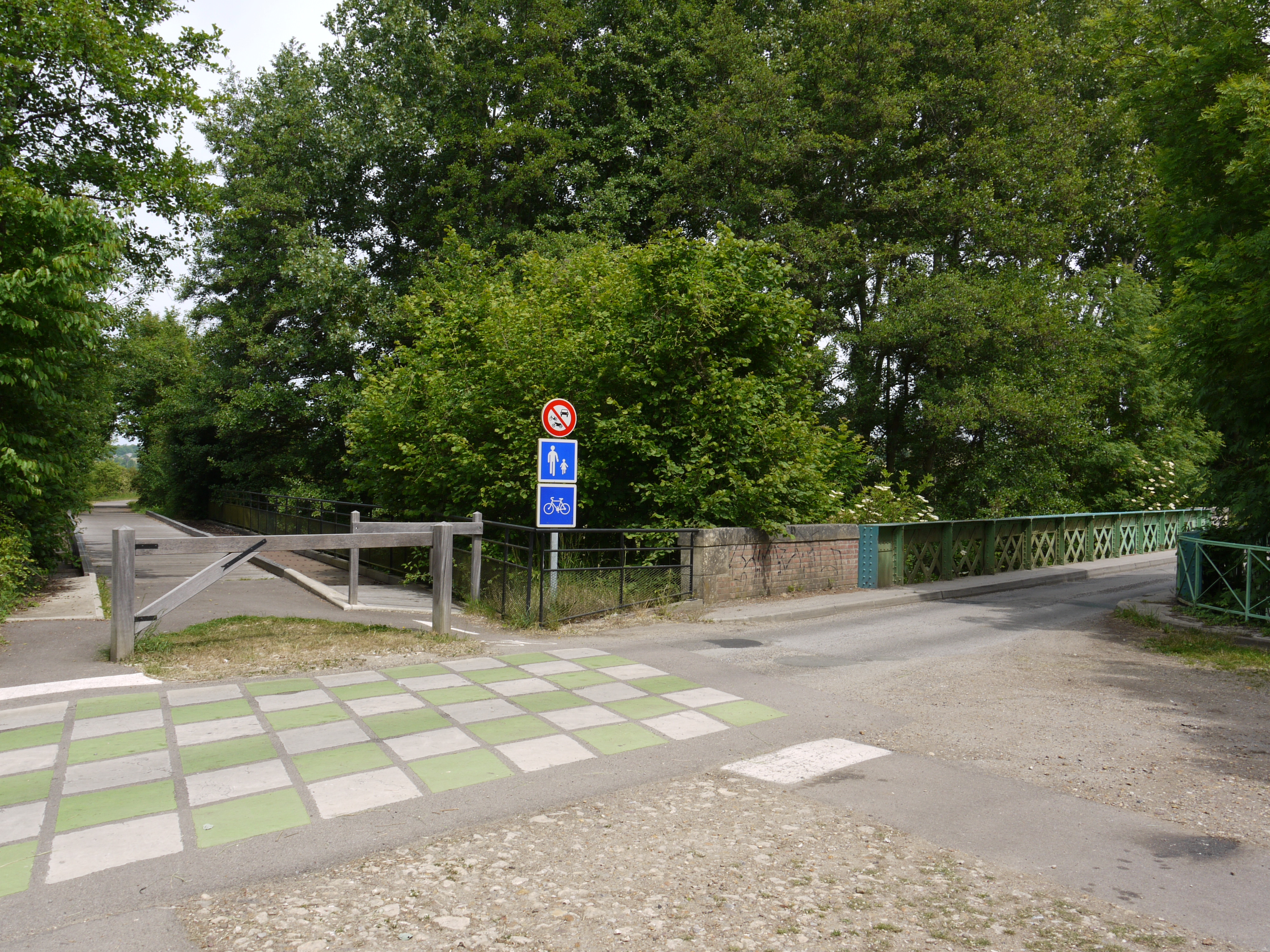 Voie Verte de la vallée de l'Epte, Eure, France